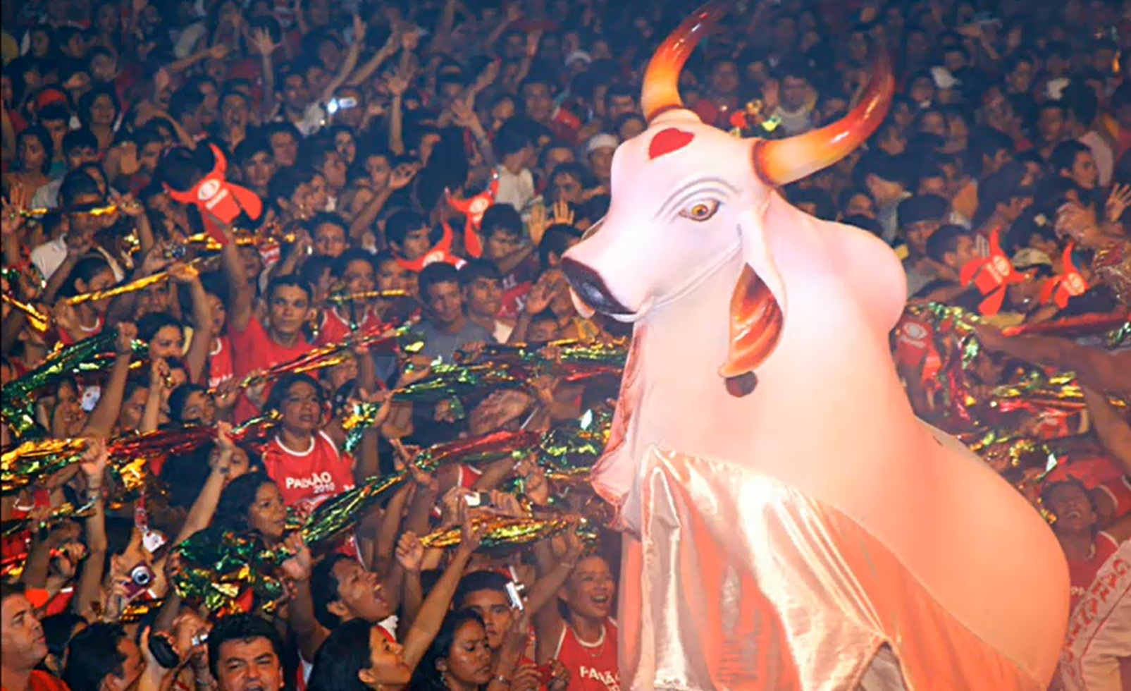 Imagen en JPG del Buey blanco con corazón rojo propio de Boi Garantido